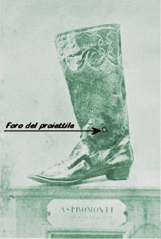 Foro d'entrata della pallottola sparata dal tenente Luigi Ferrari che colpì Giuseppe Garibaldi nella Giornata dell'Aspromonte, il 29 agosto 1862